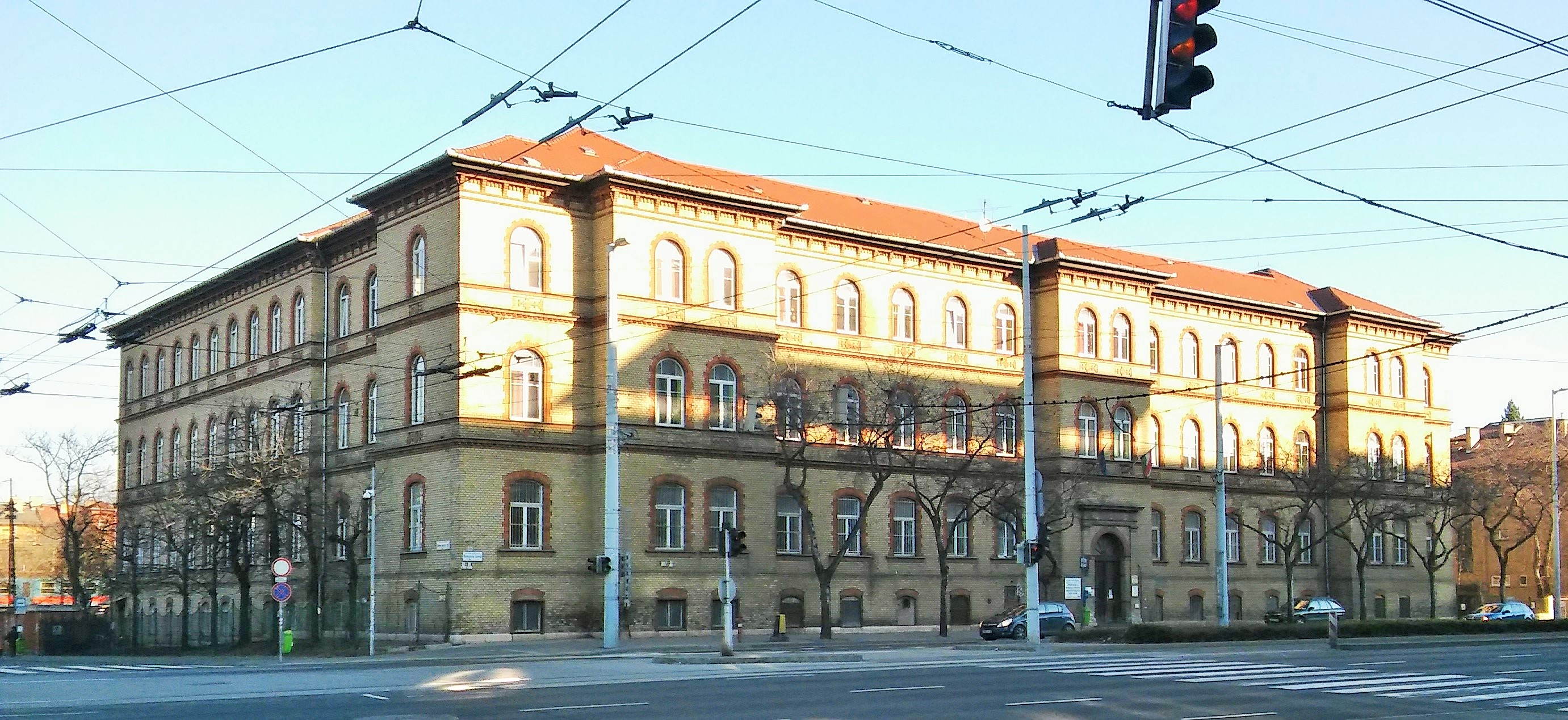 Chevra Kadisa Aggok Menháza, épült Freund Vilmos tervei szerint, ma az Uzsoki Kórház Krónikus és Rehabilitációs Belgyógyászati Osztályai működnek benne, Budapest, Hungária krt. 167, 1146